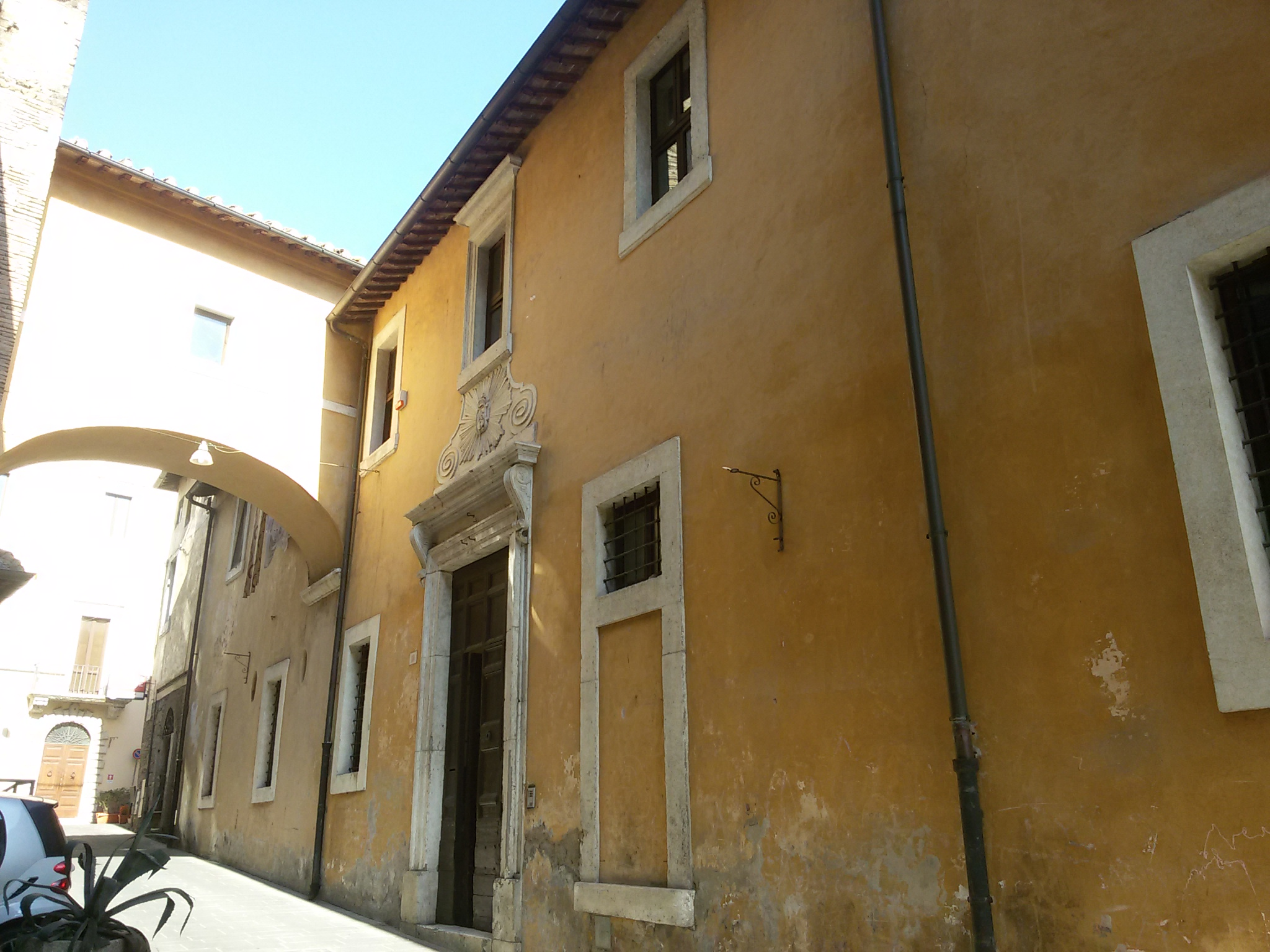 Ingresso dell'ex palazzo vescovile di Orte e passetto che conduce alla cattedrale